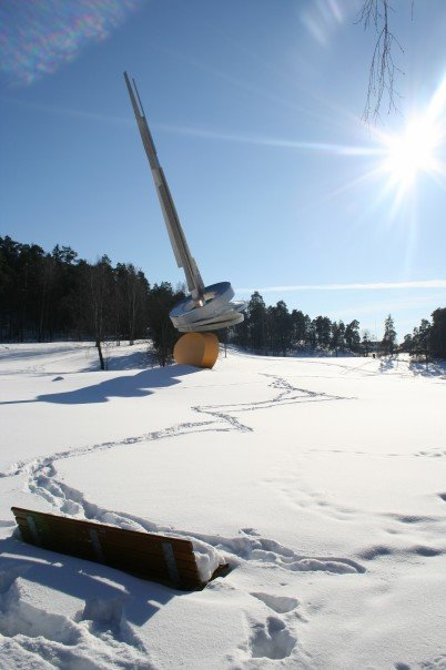 Parken på Høvikodden i Bærum, med skulptur av Arnold Haukeland